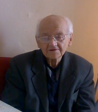 Ігор Володимирович Мурашко, знаменитий диктор українського радіо, 25 листопада 2015 року